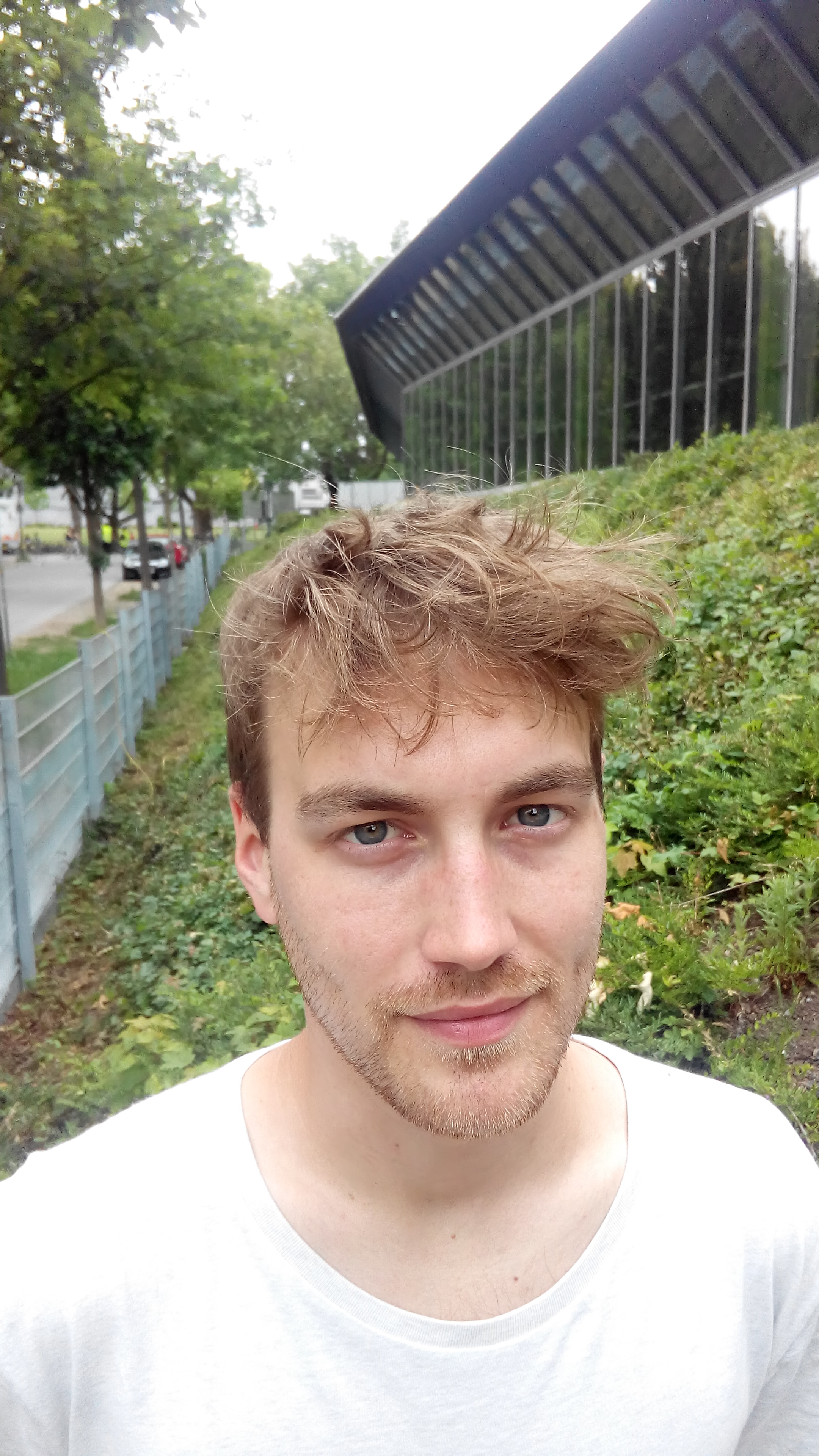 Frontman Mario Radetzky